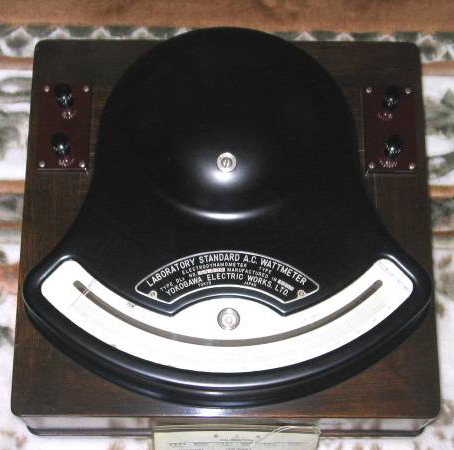 Lab. Standard Wattmeter